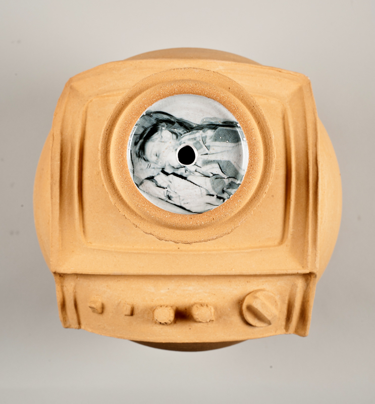 מתוך סדרת עבודות מחומר קרמי מקומי